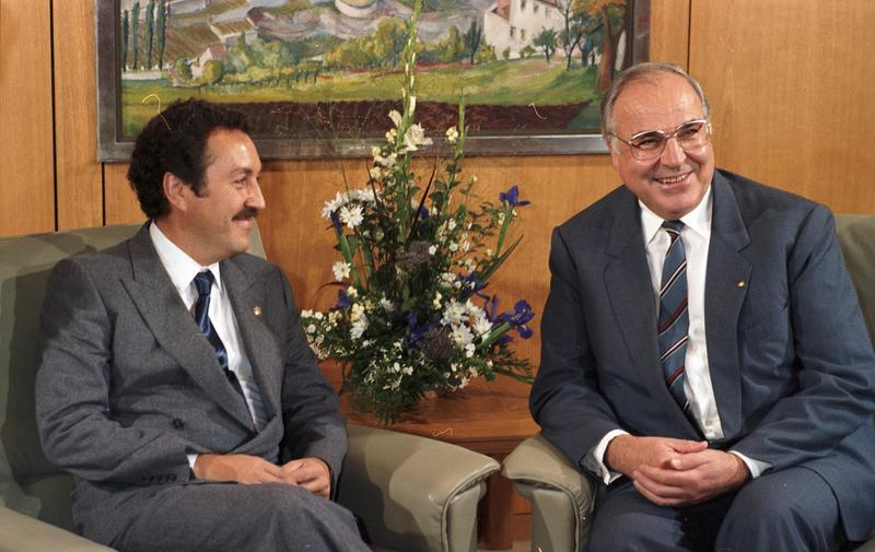 11.-15.10.1986 Besuch des Präsidenten von Guatemala, Lic. Marco Vinicio Cerezo Arévalo, und seiner Frau Lic. Raquel Blandon De Cerezo in der Bundesrapublik Deutschland. 14.-15.10.1986- Gespräch mit Bundeskanzler Helmut Kohl im Bundeskanzleramt.